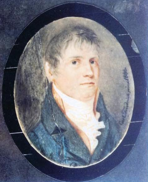 Porträt von Jacob Friedrich Seidel (1789–1860), Gründer der Seidelschen Gärtnerei, im Alter von 19 Jahren. Gemälde auf Elfenbein.